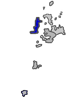 台灣省澎湖縣西嶼鄉 KaurJmeb於2005年2月8日為編輯澎湖縣zh:西嶼鄉所繪